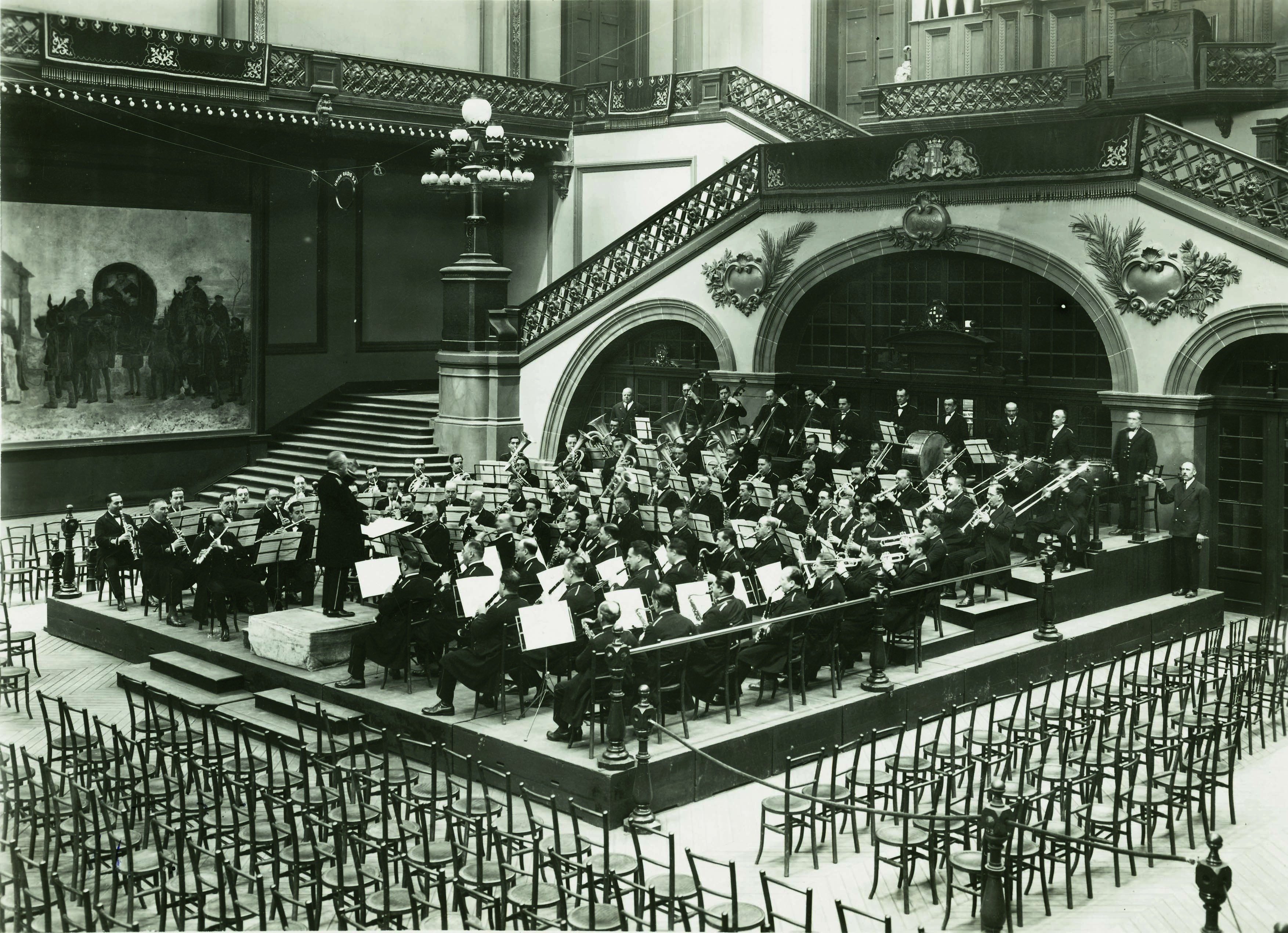 La Banda Municipal de Barcelona al desaparegut Palau de les Belles Arts el 1927.